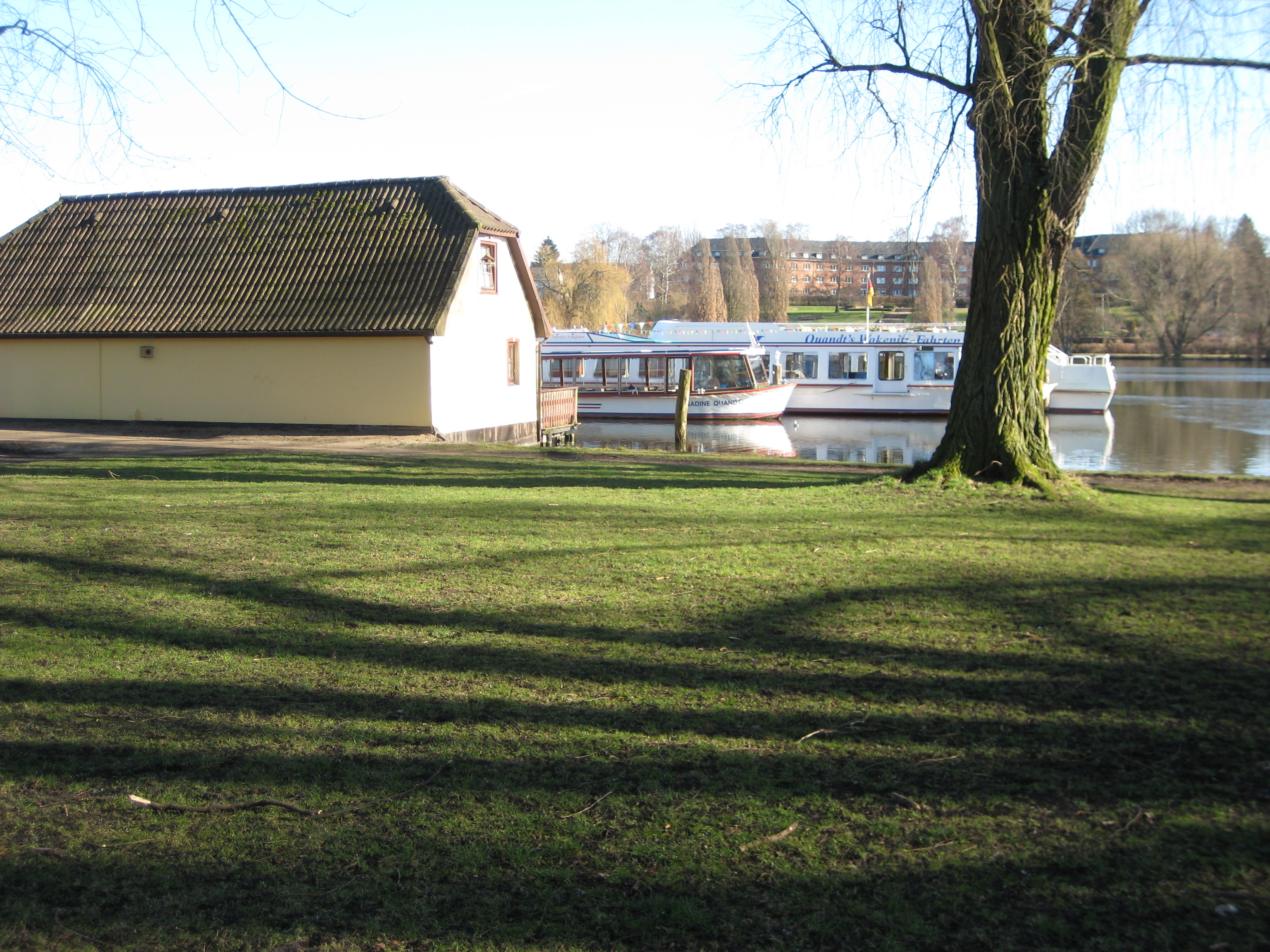 Wakenitzufer, Grünanlage auf der Ostseite, mit Sitz eines Wakenitzschiffahrtsunternehmens, zwei der Ausflugsschiffe; im Hintergrund auf der Ostseite der Wakenitz das Wohngebäude "Tor der Hoffnung", errichtet von Rodolfo Groth